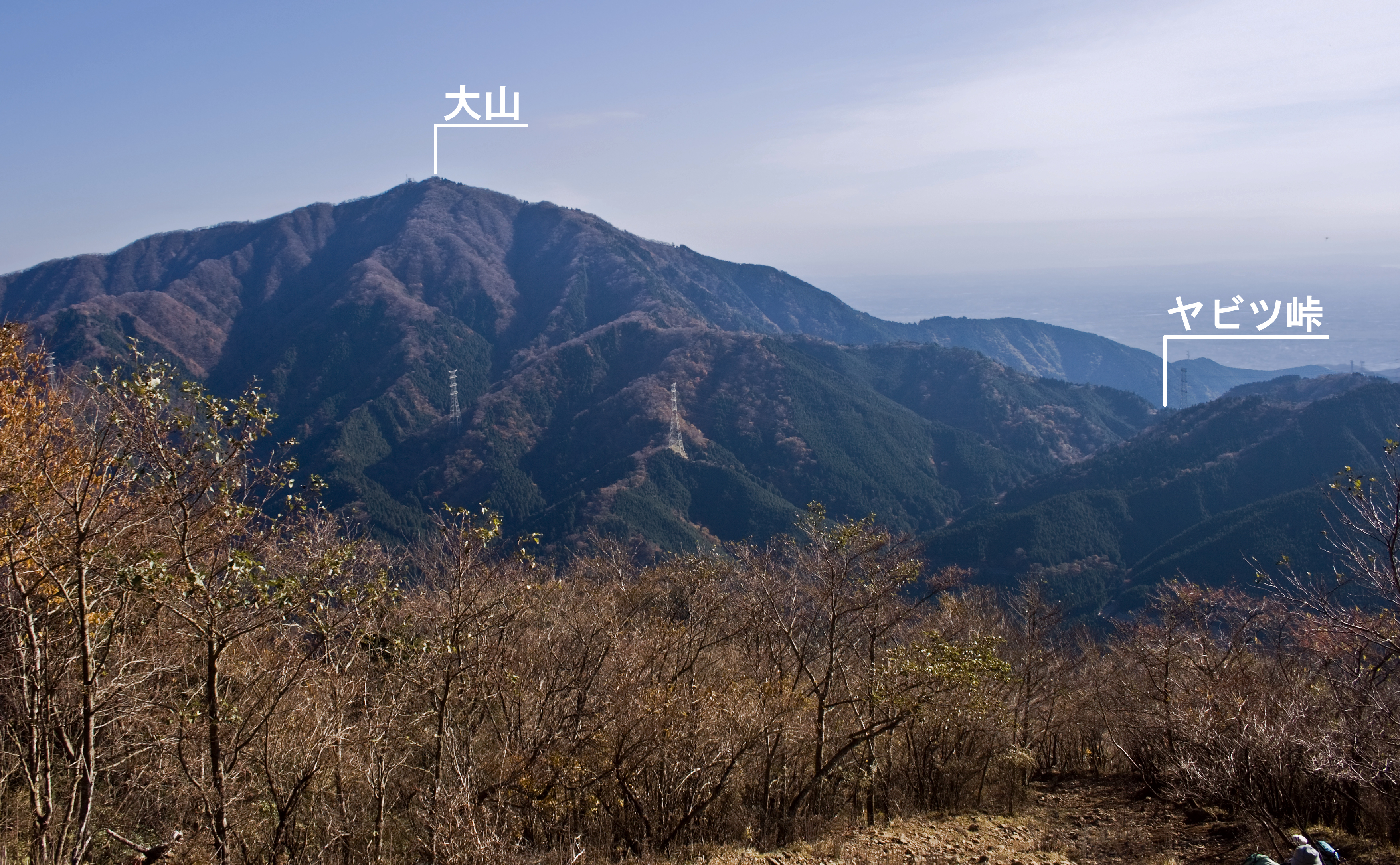 二ノ塔付近より望む大山